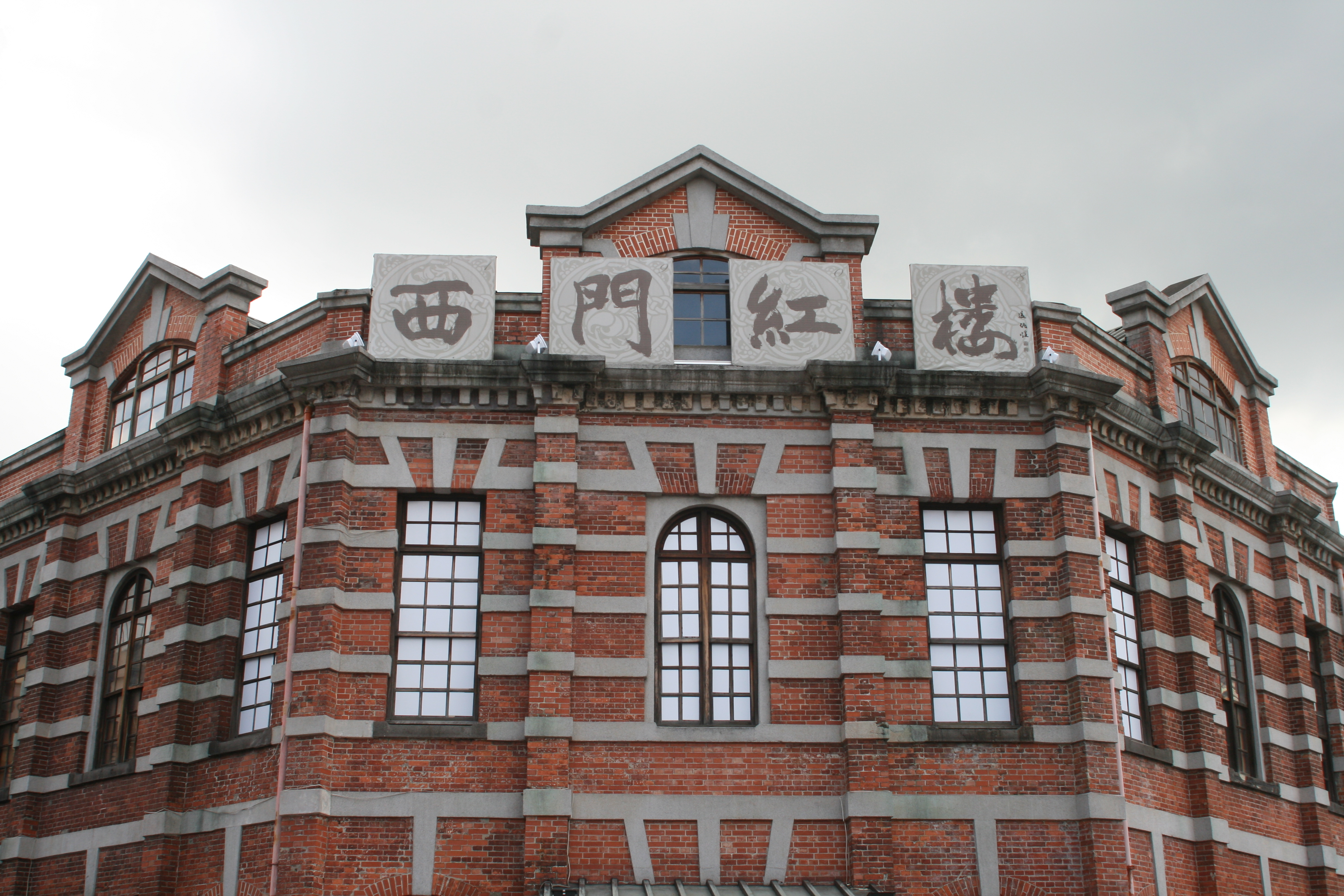 西門紅樓八角樓頂樓字牌，張炳煌題字。